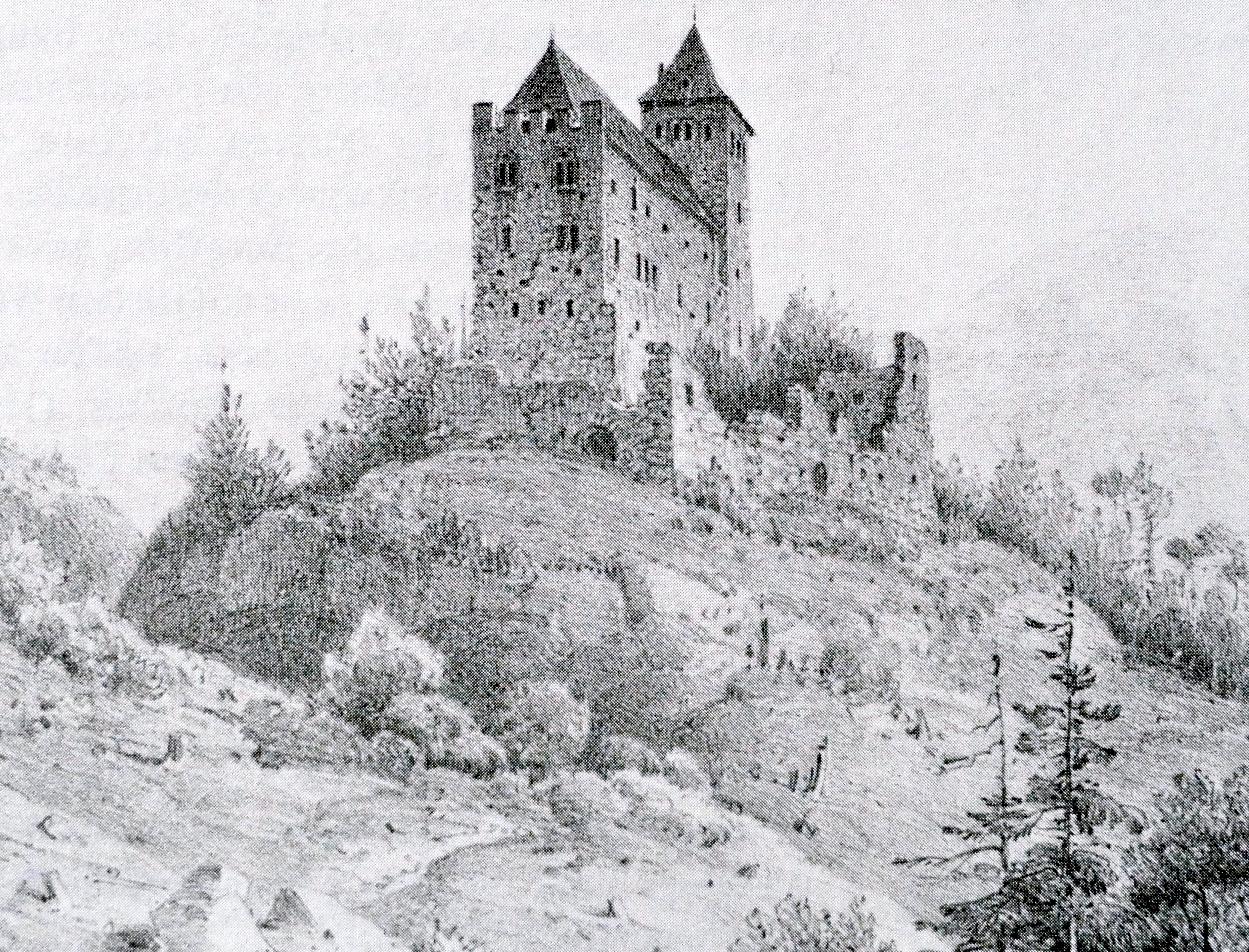 Burg Riom von Norden, um 1800 Rumantsch: Igl casti da Riom digl nord, anturn igl 1800